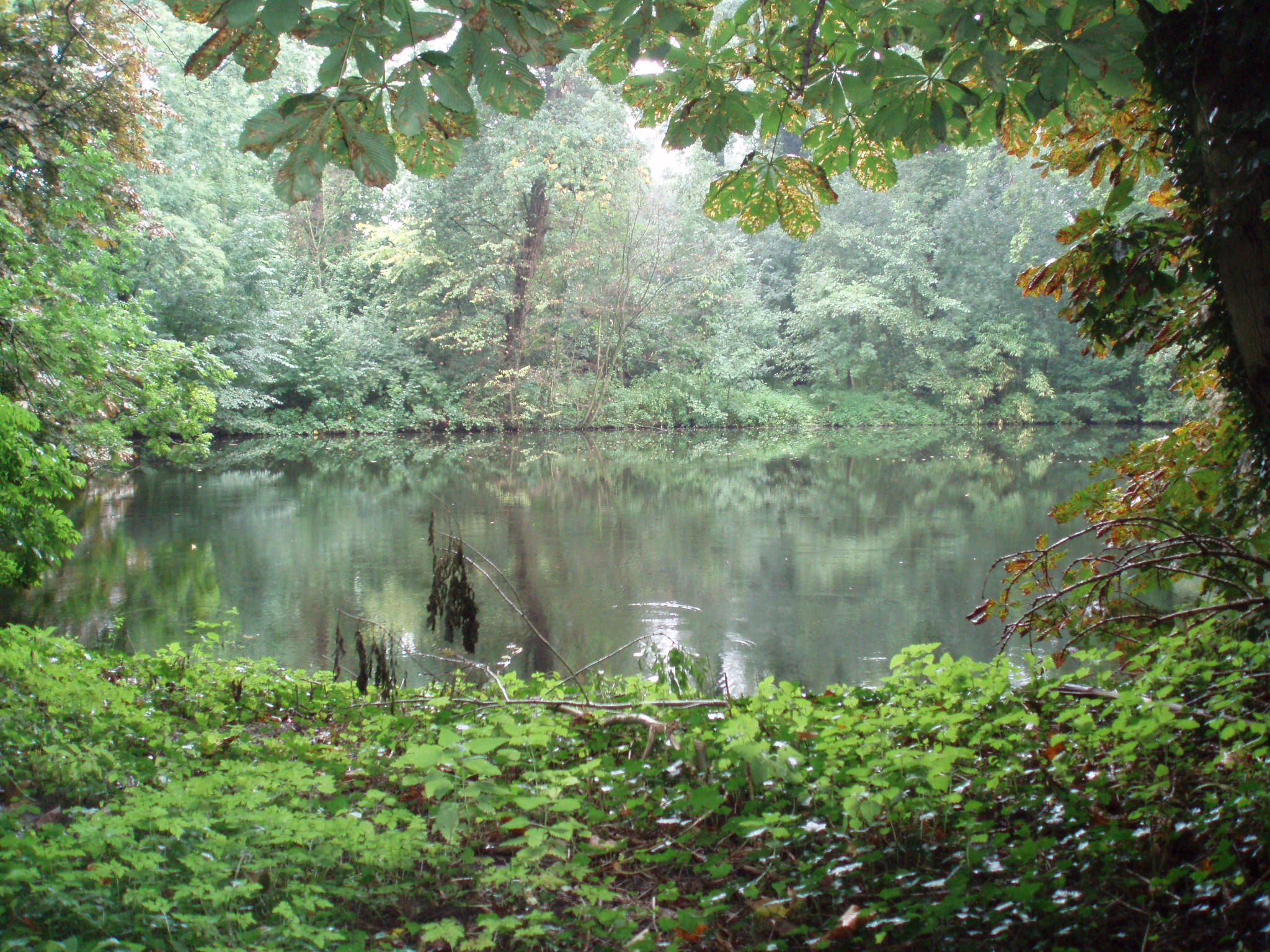 Vijver bij de ijskelder van Huis te Linschoten. Hieruit werd in de winter ijs gezaagd.